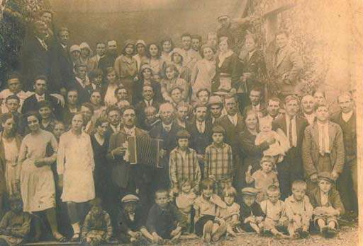 Српски (ћирилица): Словеначко друштво Триглав, које је основано у Бања Луци 1934. године.